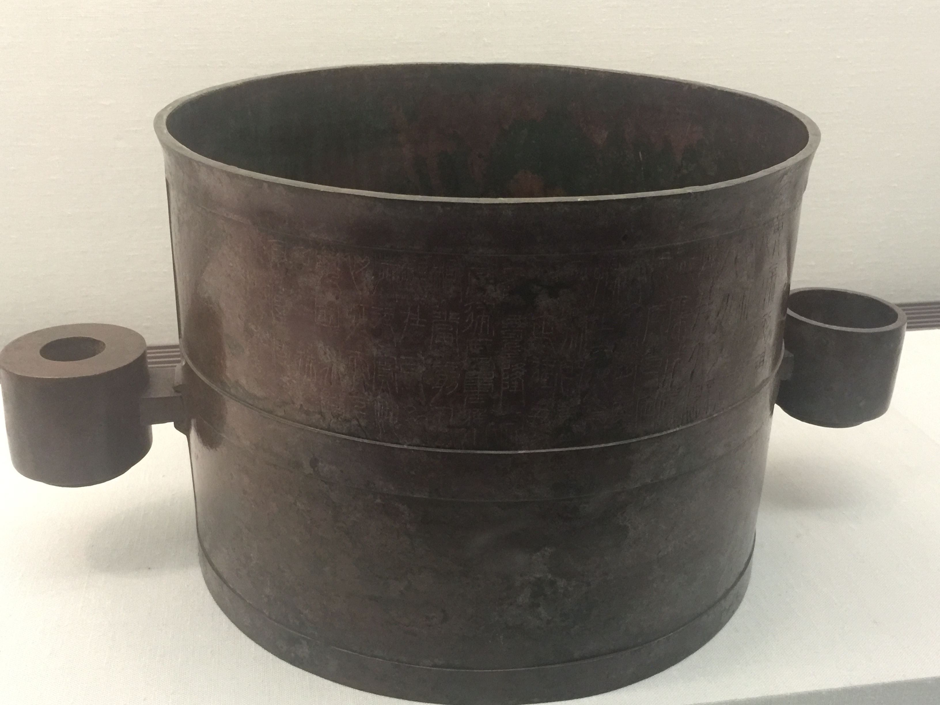 新莽嘉量，新莽时期，國立故宫博物院館藏。